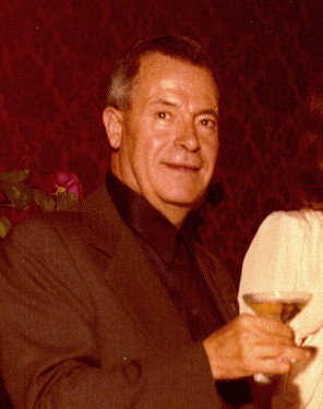 Mons. Paolo Collura (1914–1997), paleografo, diplomatista, direttore del Museo diocesano di Palermo